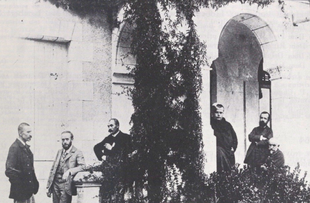 Joris-Karl Huysmans (assis, tout à droite) et quelques amis devant la Maison Notre-Dame à Ligugé (département de la Vienne), vers 1900.